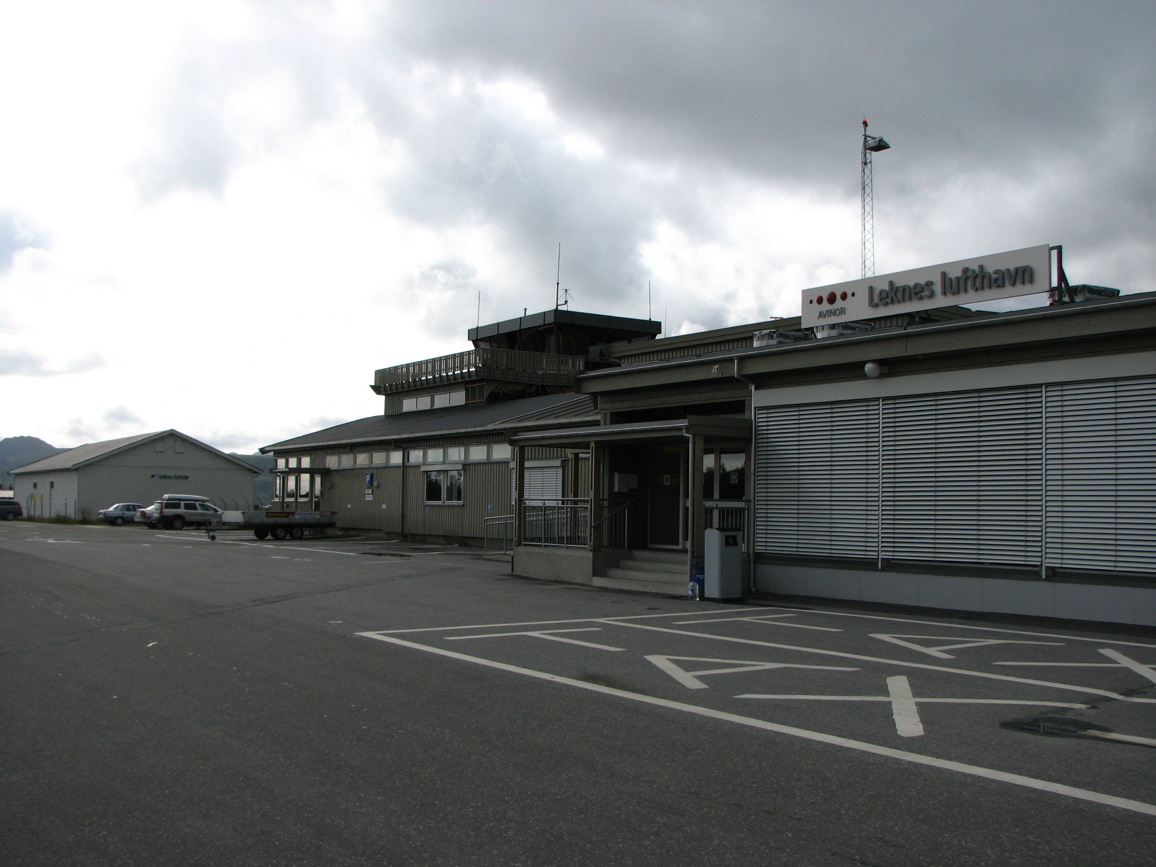 Leknes lufthavn